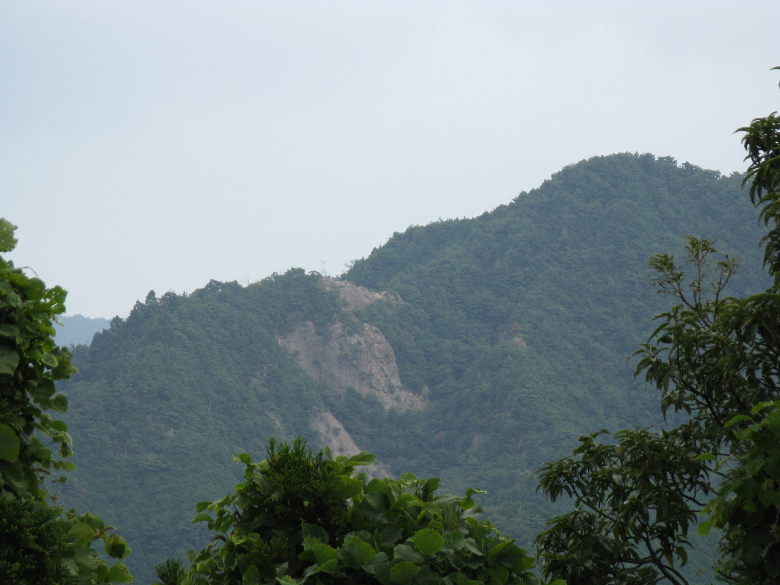 槇尾山の蔵岩(左）と山頂(右） （槇尾山グリーンランド展望台より撮影)